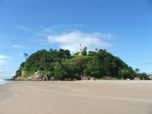 Morro do Cristo em Guaratuba, um dos locais mais visitados do município..